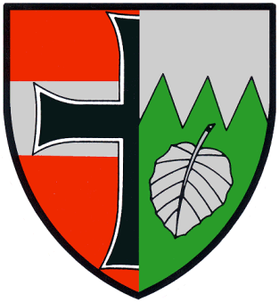 Wappen von Laab im Walde